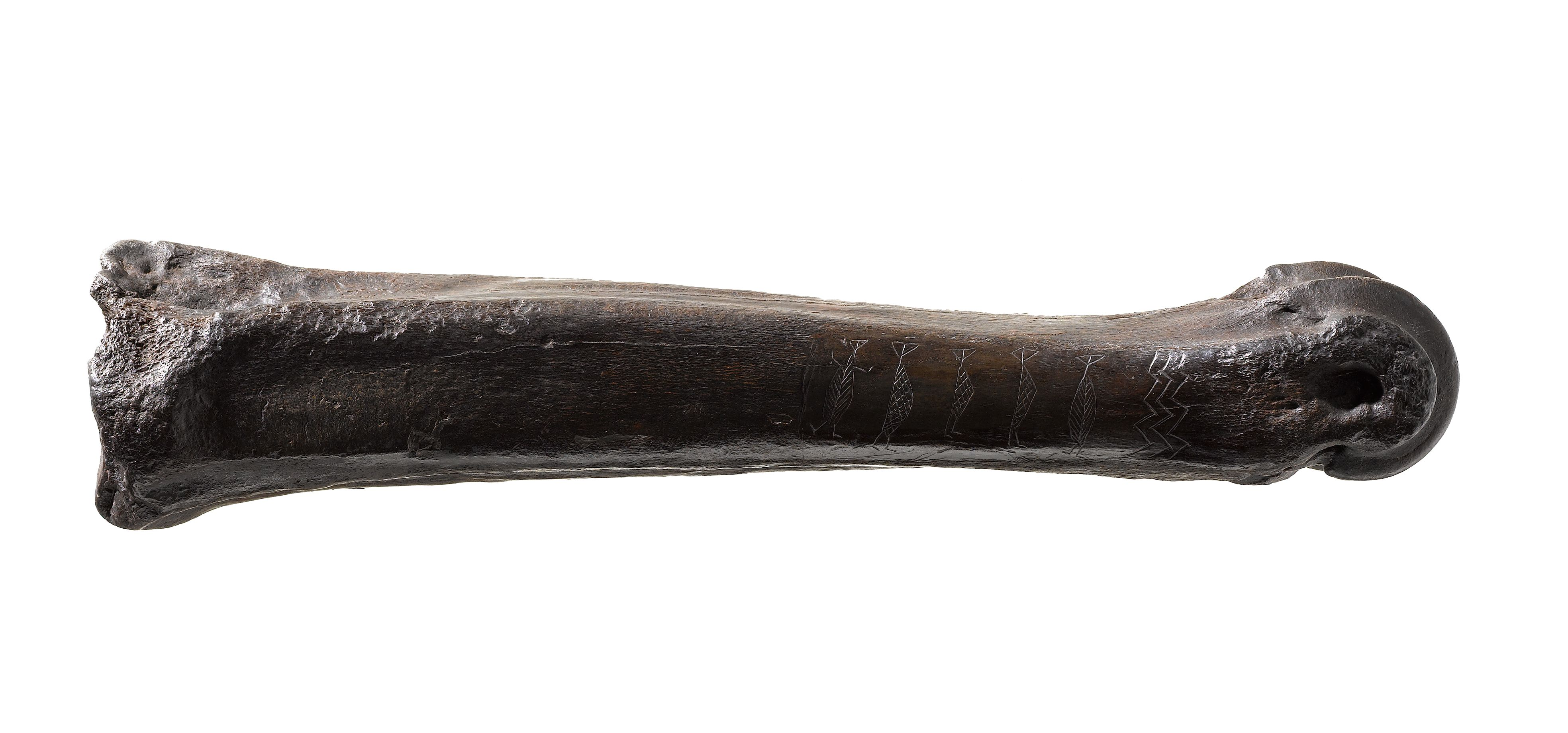 Mellemfodsknogle af urokse med 5 menneskefigurer indridset. Fra Ryemarksgård, Jystrup sogn.